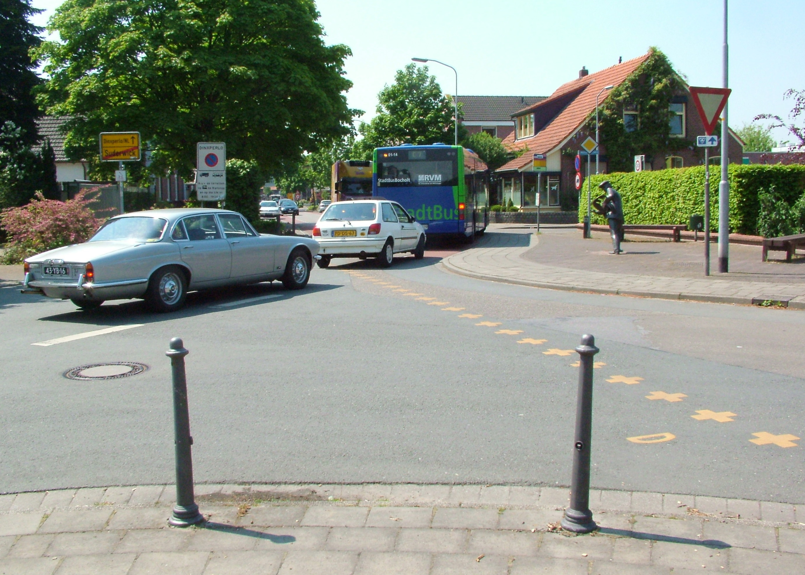 Suderwick, Grenze am Hellweg